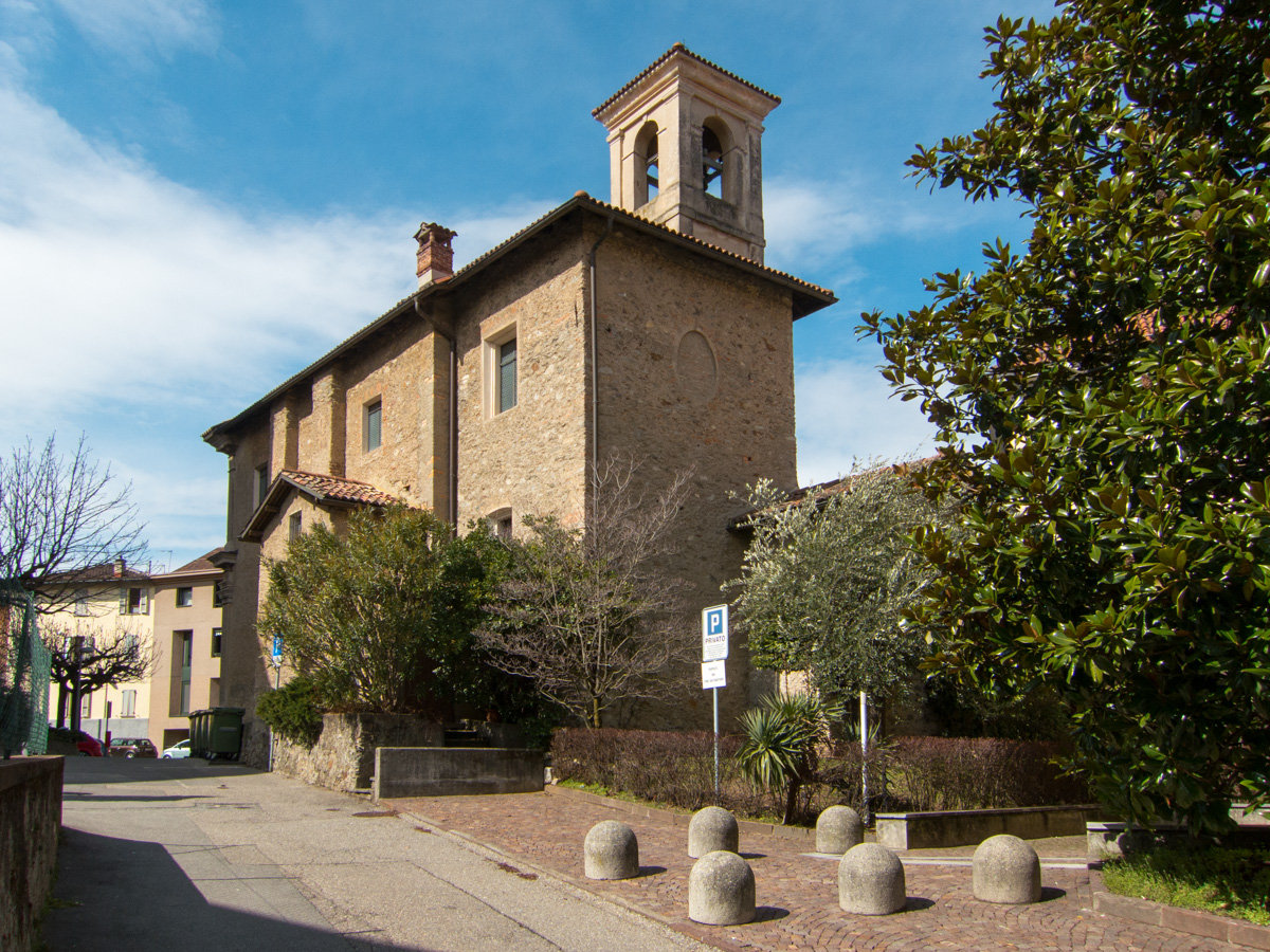 Oratorio di San Sebastiano in Breganzona, Lugano